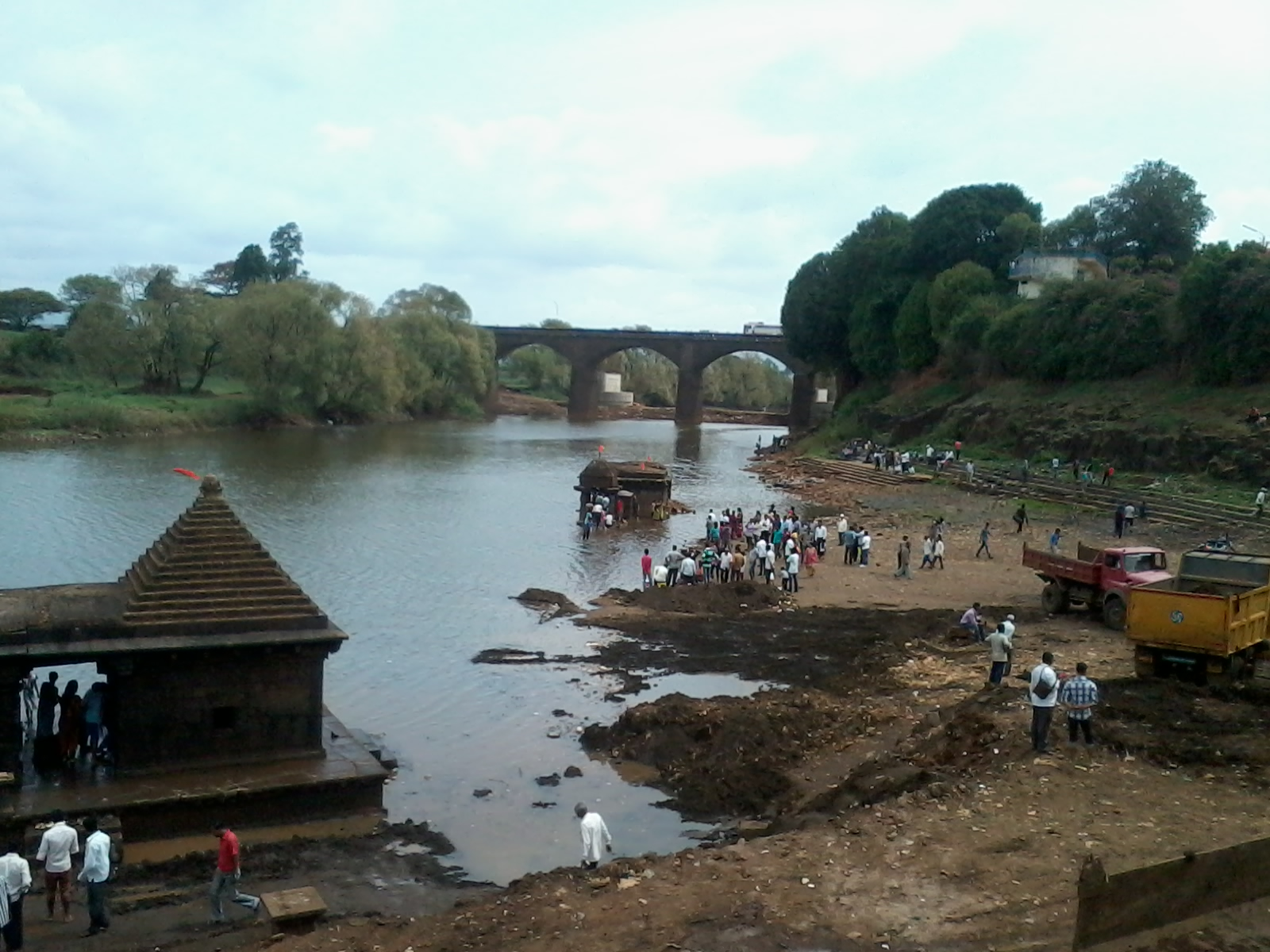 पंचगंगा नदी घाट